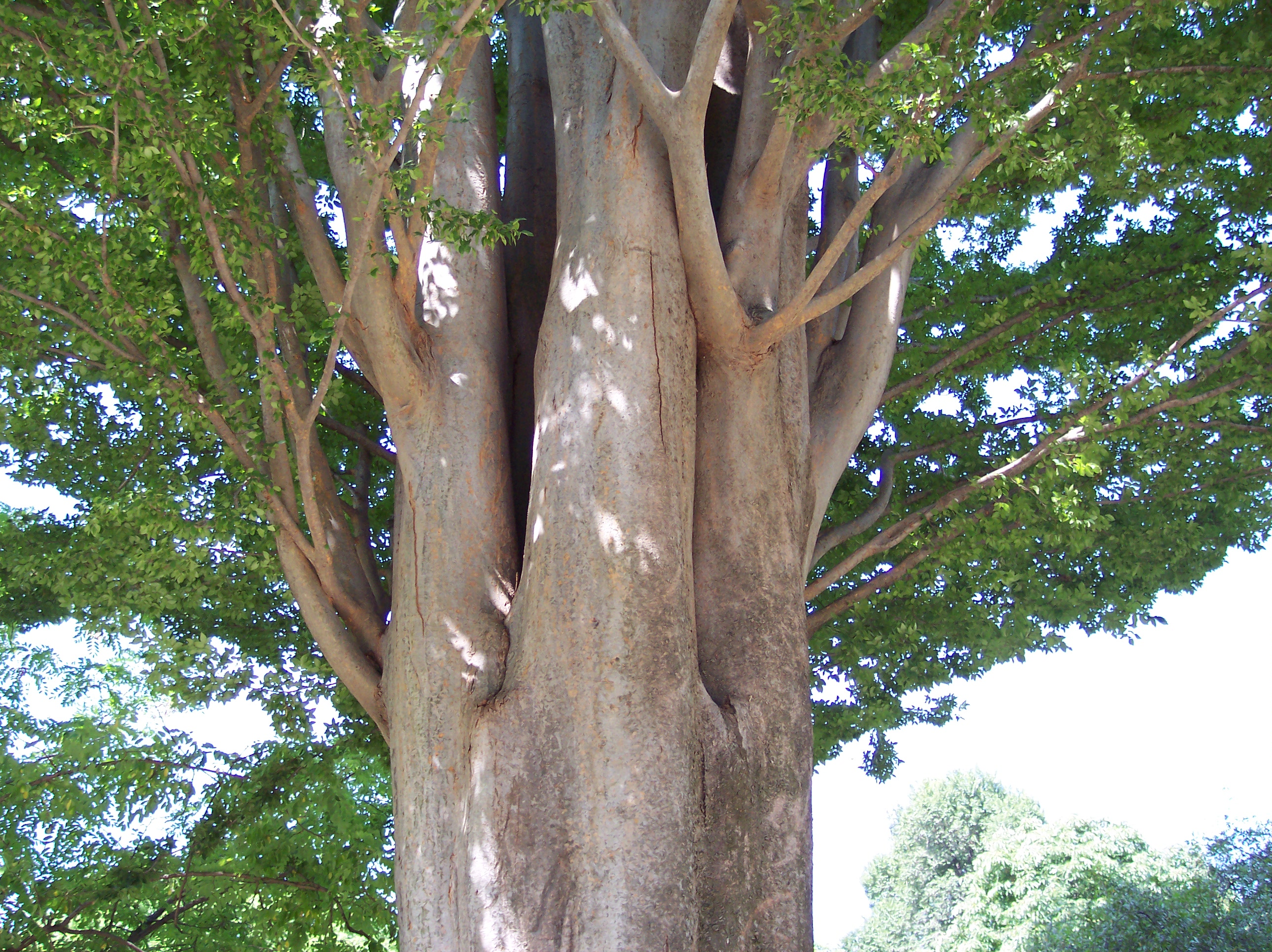 Zelkova carpinifolia. Real Jardín Botánico, Madrid